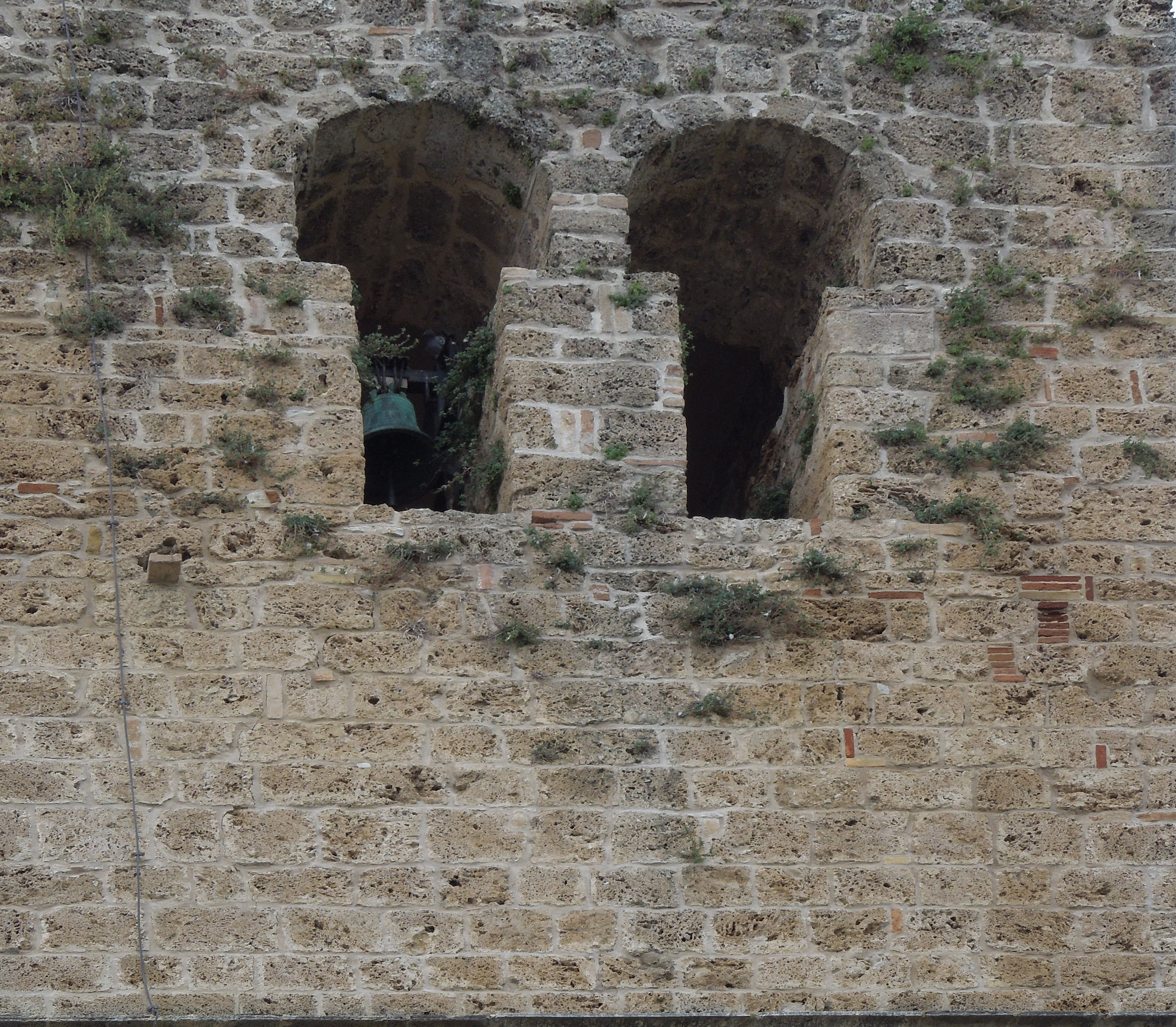 Finestre a coppia ad arco a ferro di cavallo della Torre del Melatino di Nocella di Campli in provincia di Teramo.